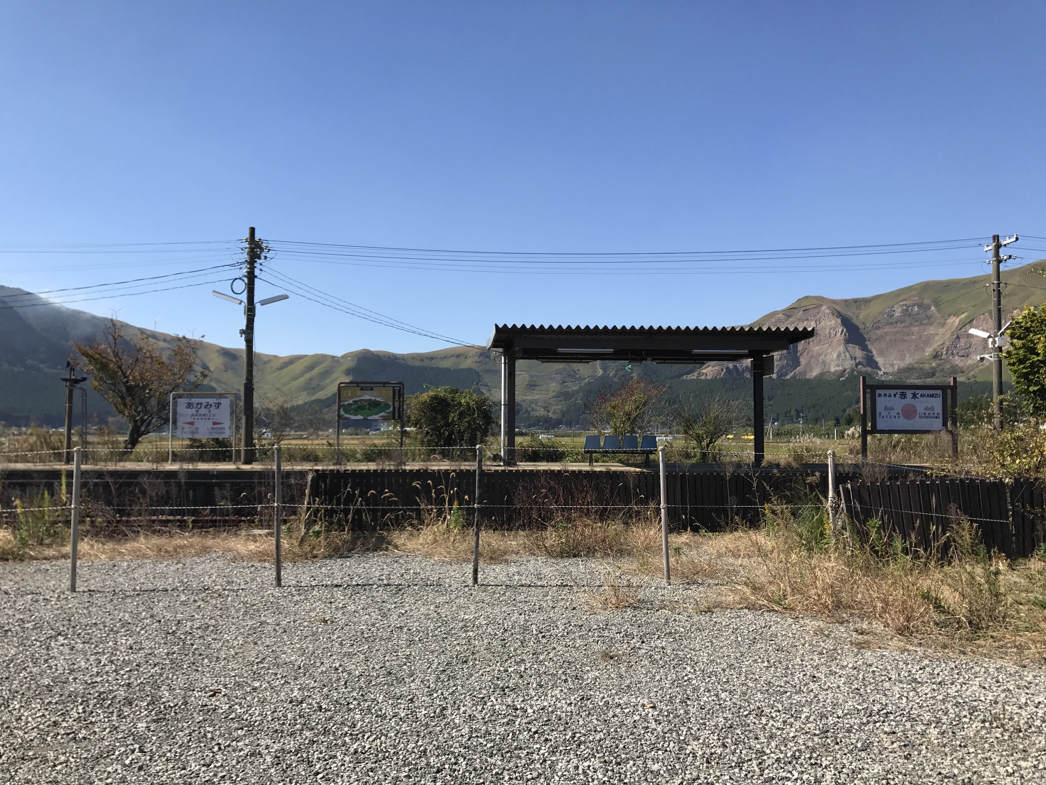 熊本地震で被災した赤水駅のホーム